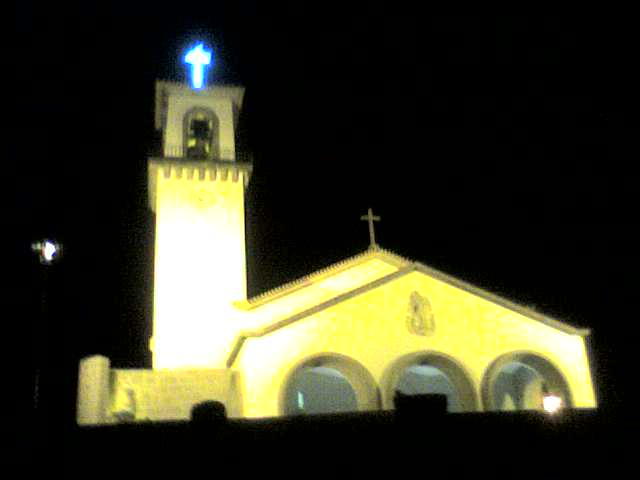 Igreja de Perre, Perre, Viana do Castelo, Portugal